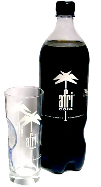 Bottiglia di africola e bicchiere